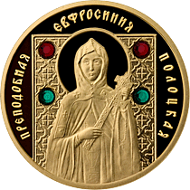 Памятна монета банку Білорусі "Преподобна Єфросинія Полоцька"